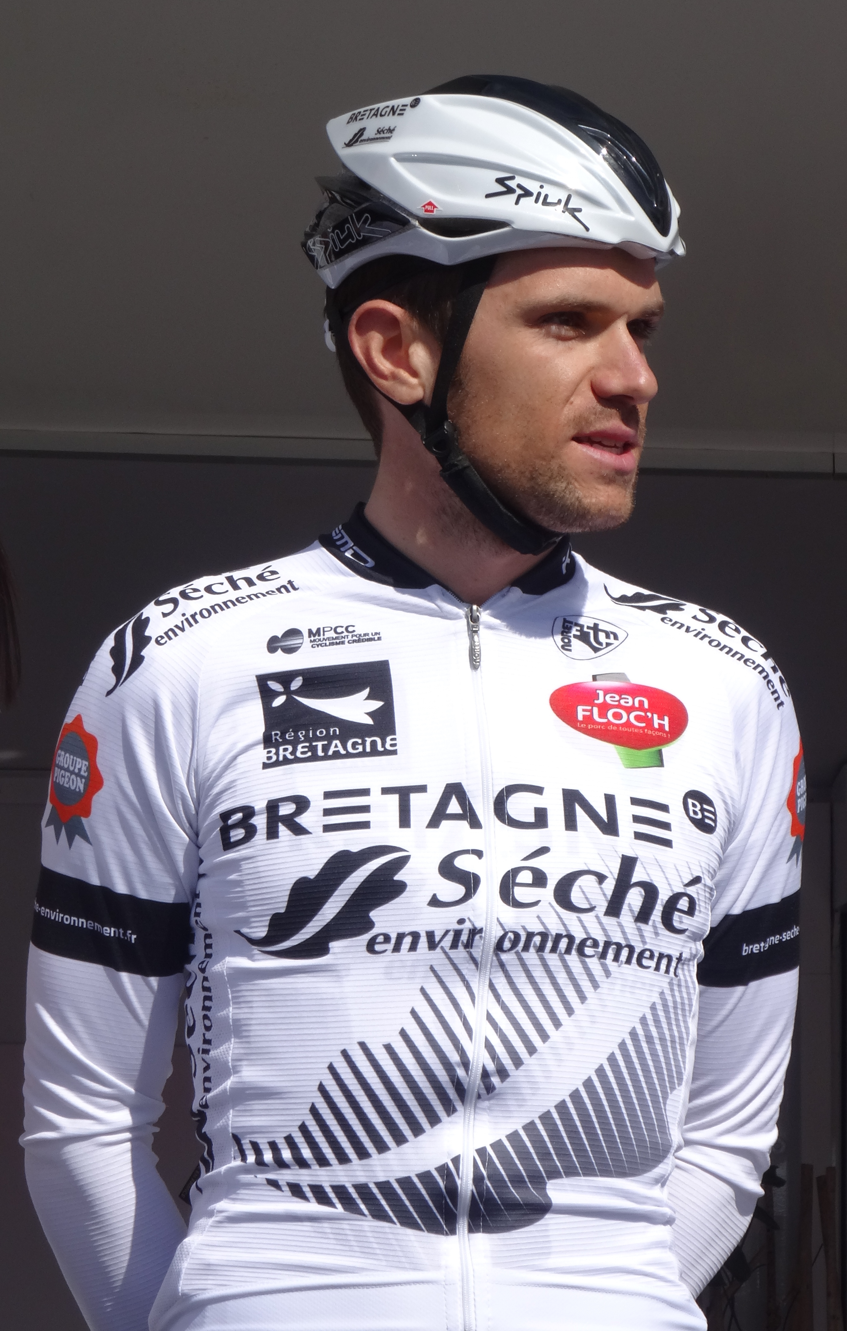 Reportage réalisé le jeudi 17 avril à l'occasion du départ et de l'arrivée du Grand Prix de Denain 2014 à Denain, Nord, Nord-Pas-de-Calais, France.